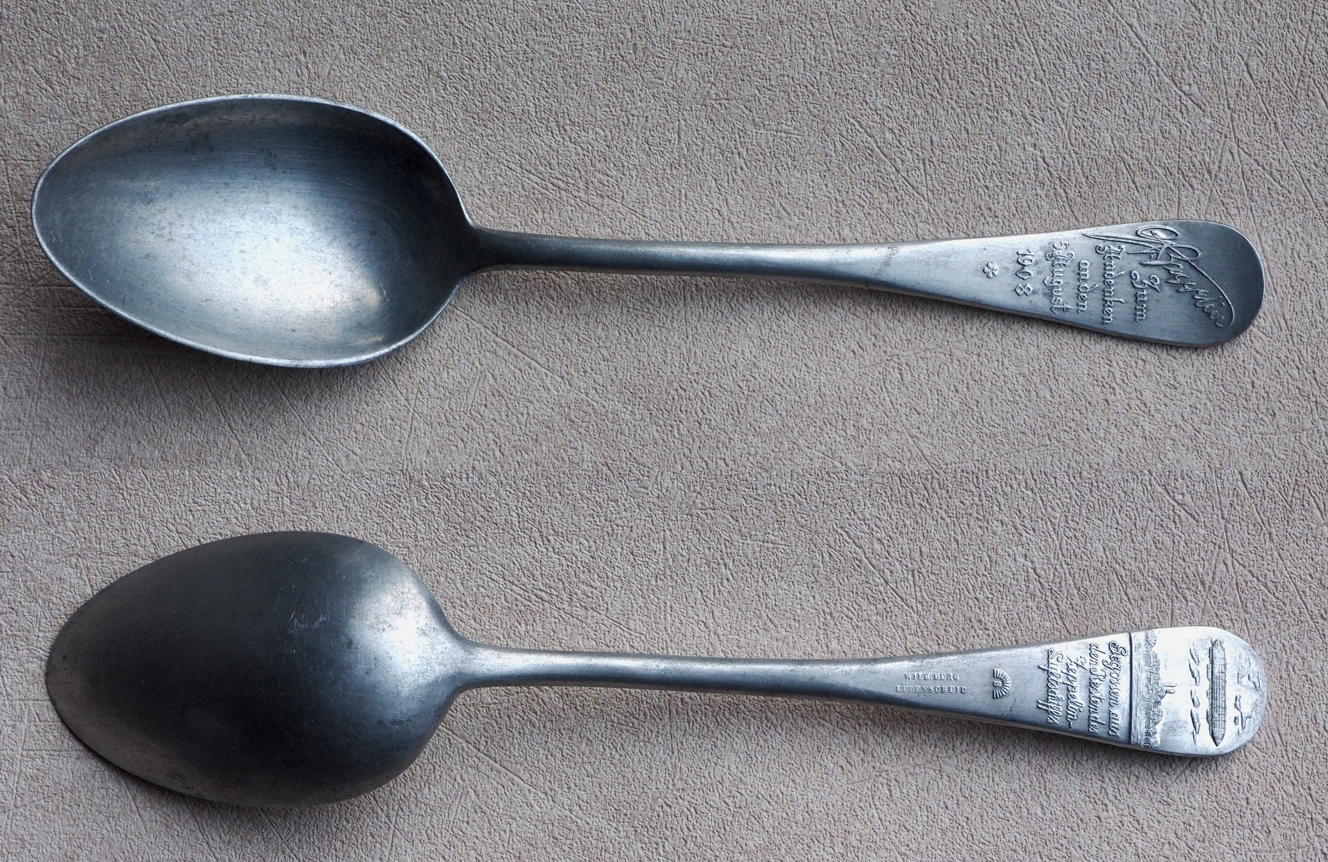 Aluminium-Löffel aus den Trümmerteilen des 1908 verunglückten Zeppelins Luftschiff LZ 4